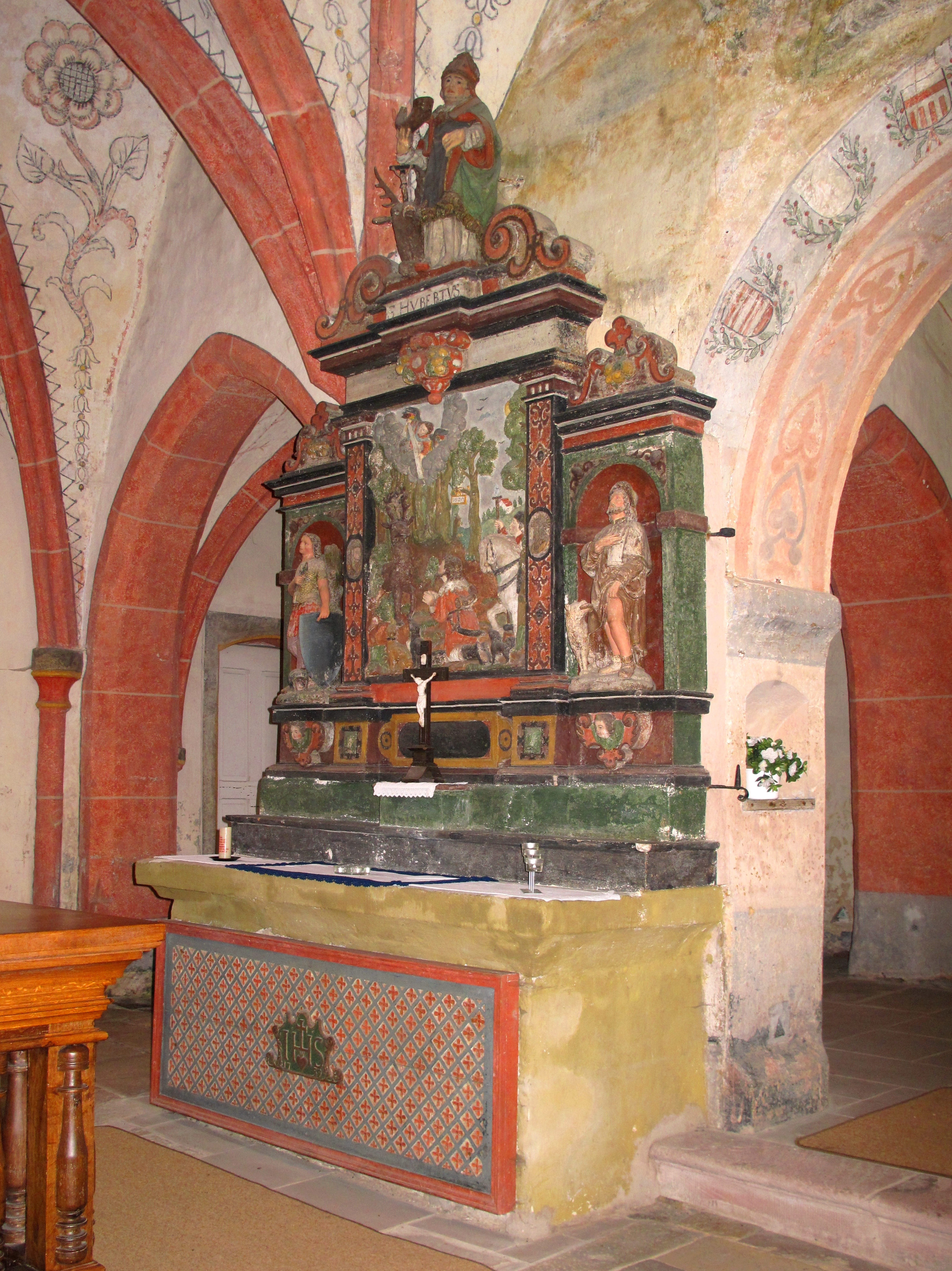 Wolsfeld, Alte Kirche, Altar von 1620.